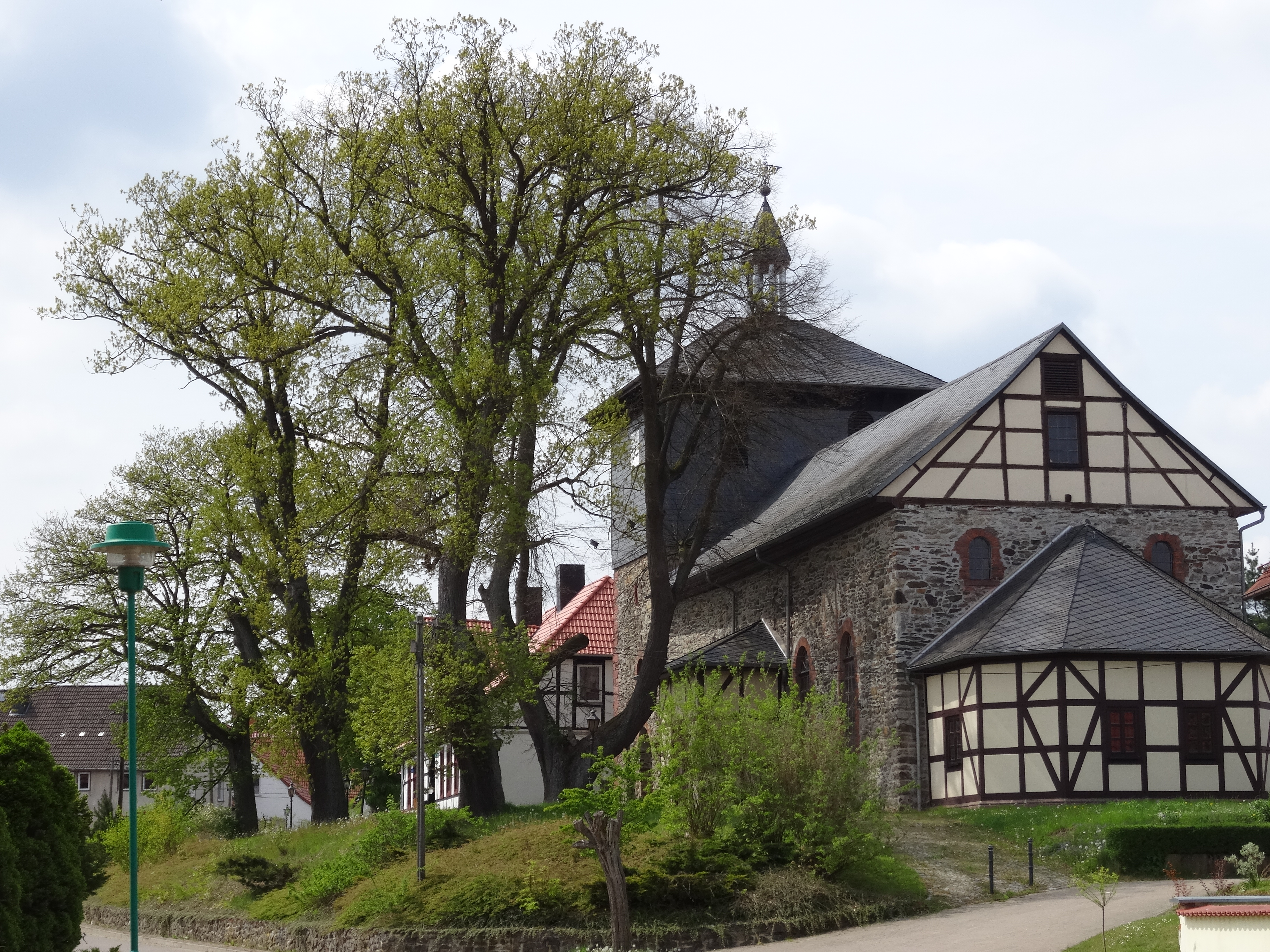 Stadtkirche Sankt Margareten in Breitenstein (Harz)